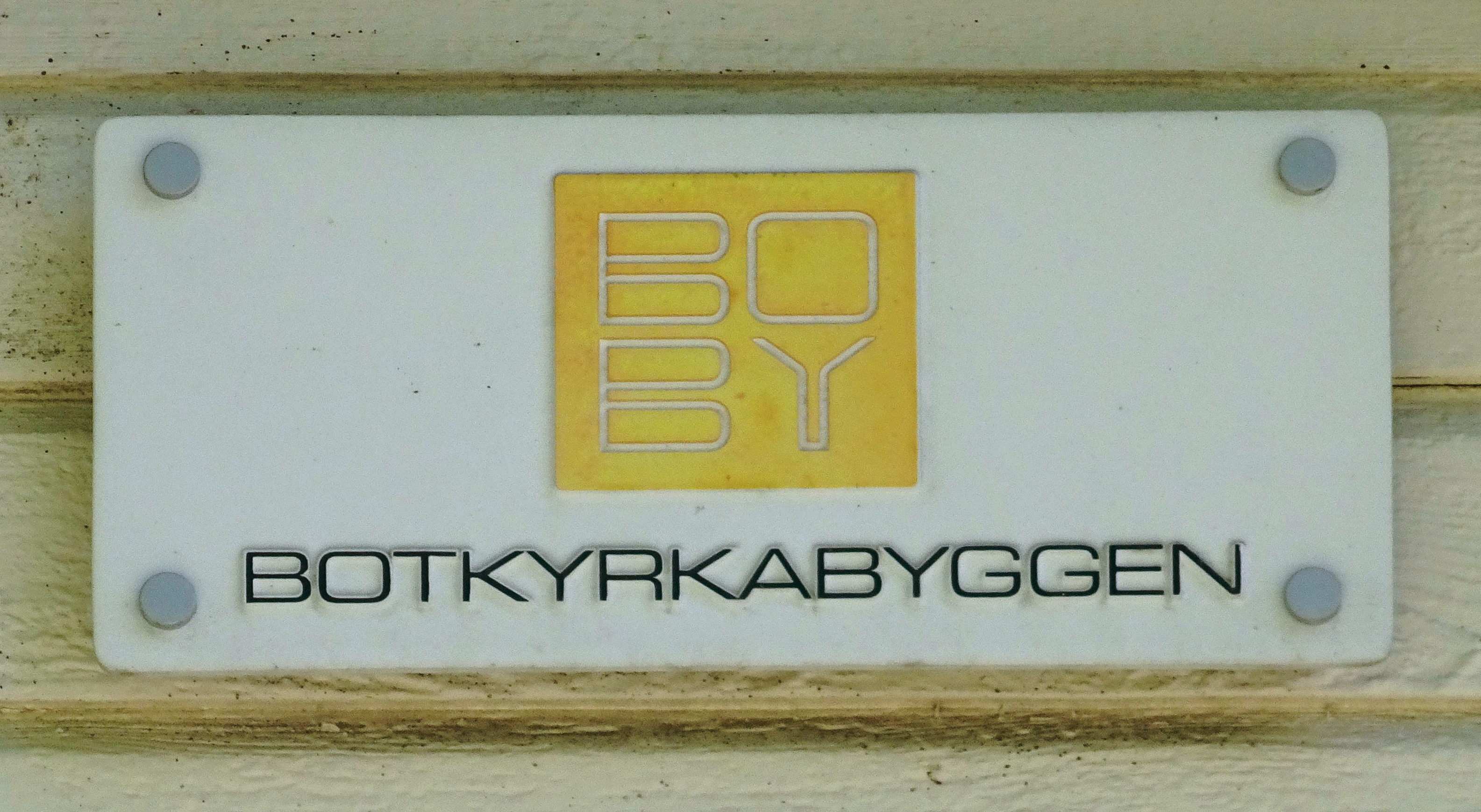 Botkyrkabyggens skylt på en fasad i Vita villorna